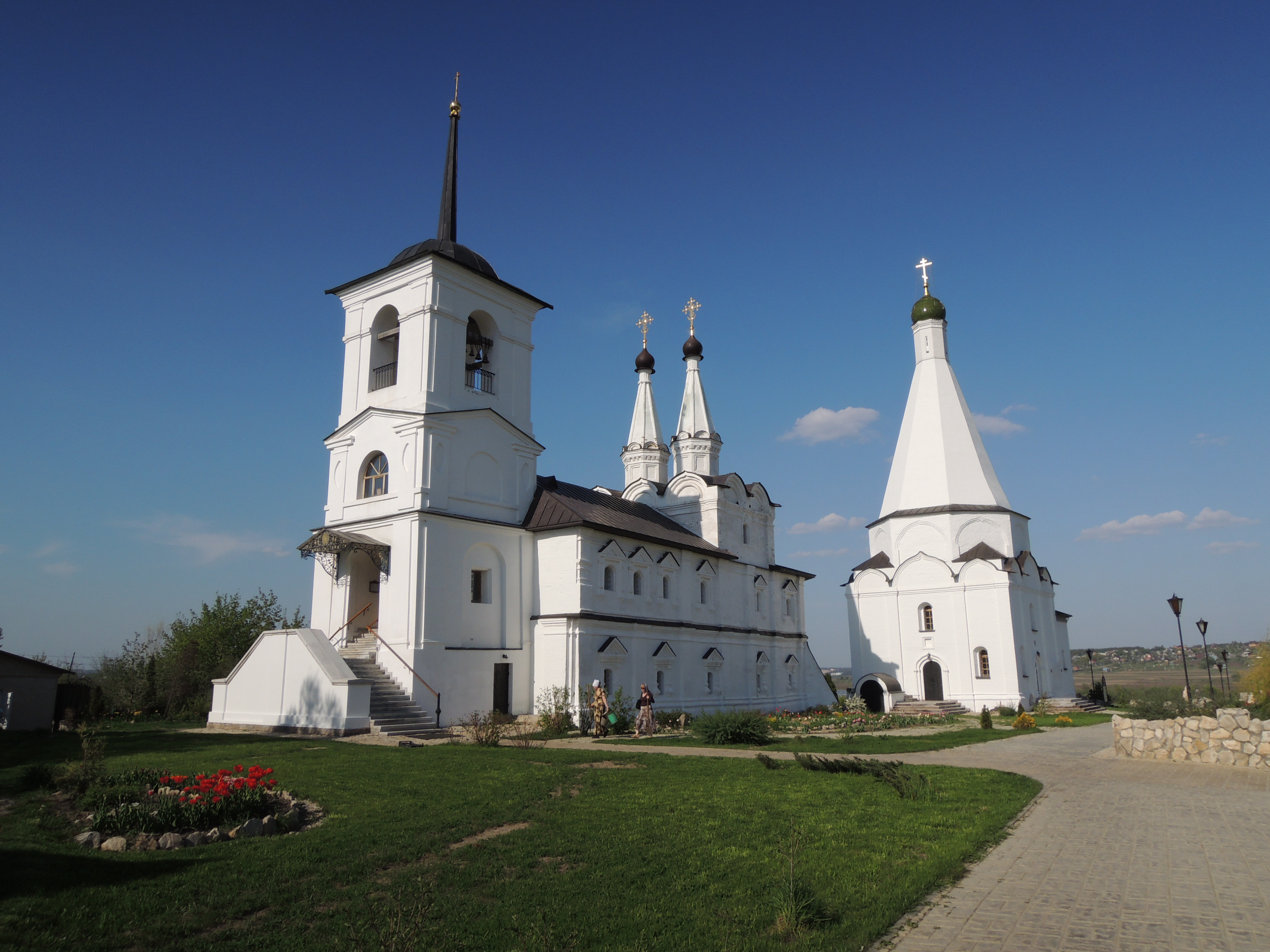 Спасо-Преображенский Воротынский монастырь (Спас на Угре, На-Усть-Угры-Спасо-Воротынский монастырь)